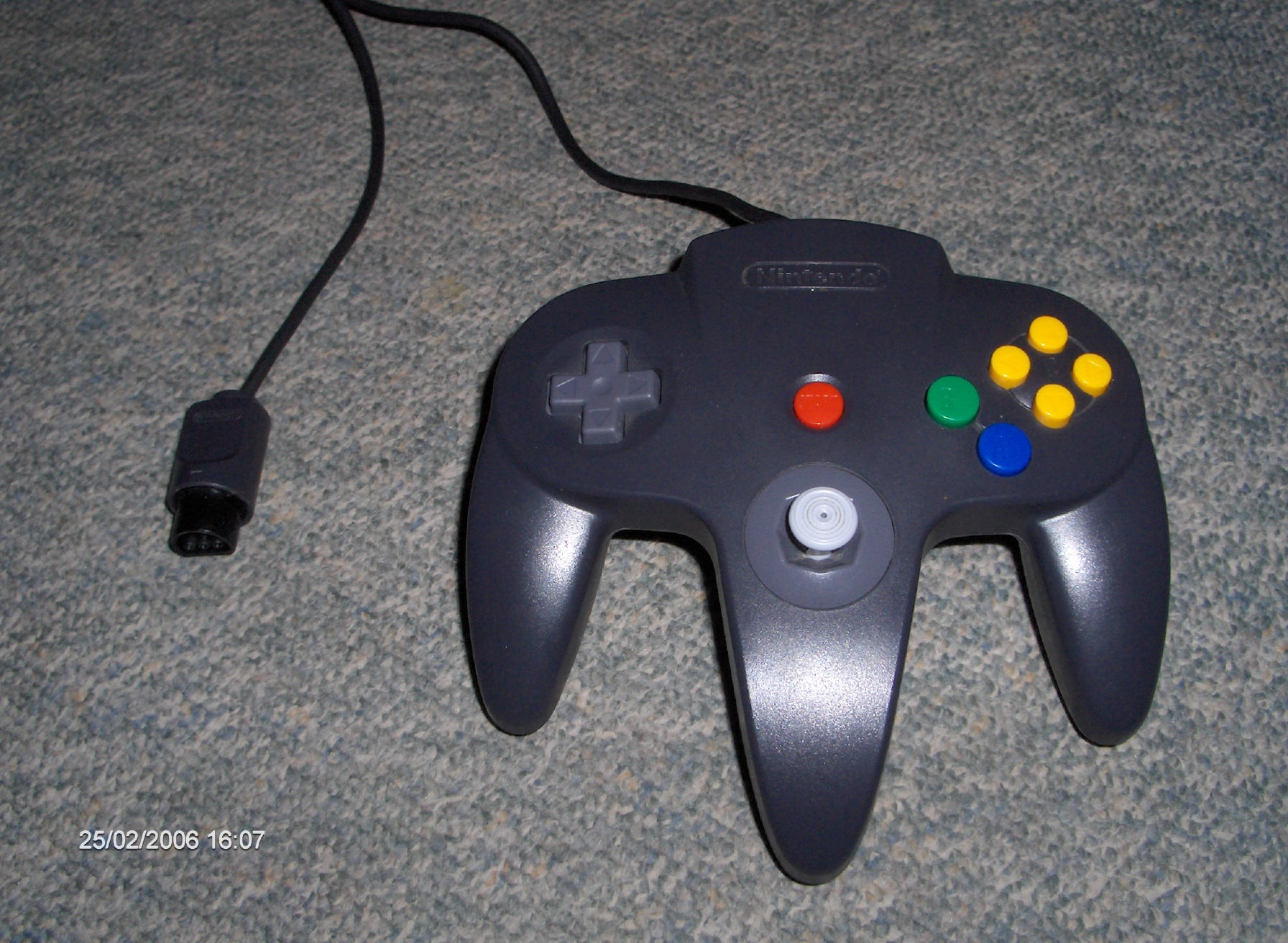 Mijn Nintendo 64 controller